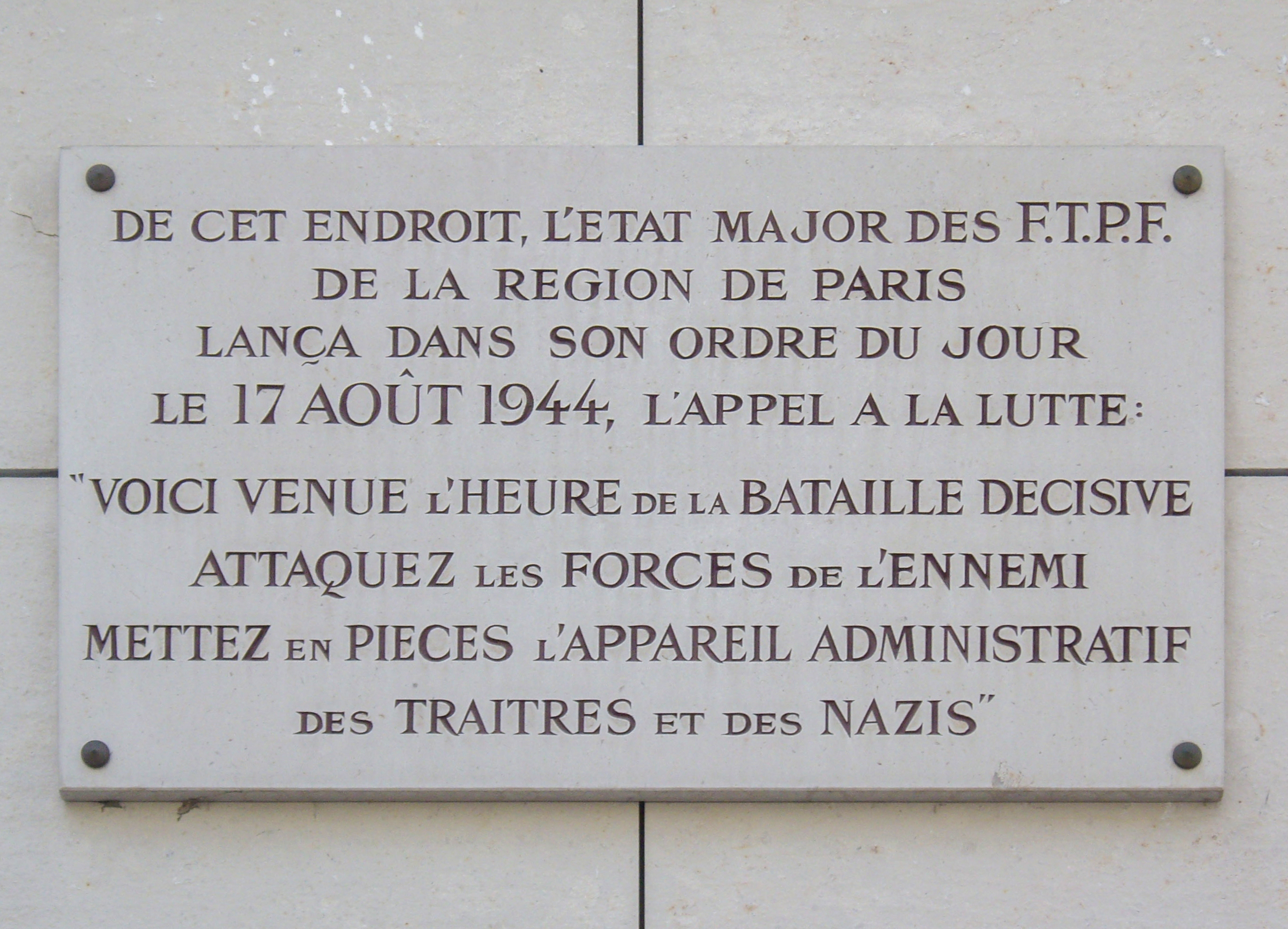 Plaque apposée au n° 116 de l'avenue d'Italie, Paris 13e.De cet endoit, l'état-major des FTPF de la région de Paris lança dans son ordre du jour, le 17 août 1944, l'appel à la lutte :« Voici venue l'heure de la bataille décisive. Attaquez les forces de l'ennemi, mettez en pièces l'appareil administratif des traitres et des nazis. »